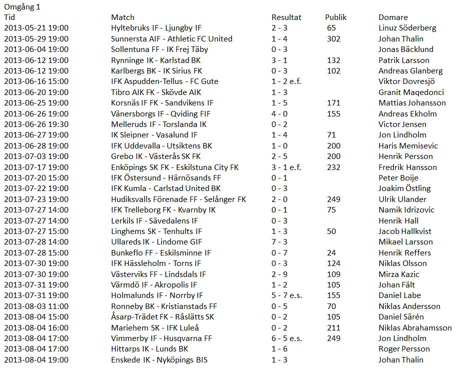 En lista med resultat från Svenska cupen omgång 1 2013-2014.